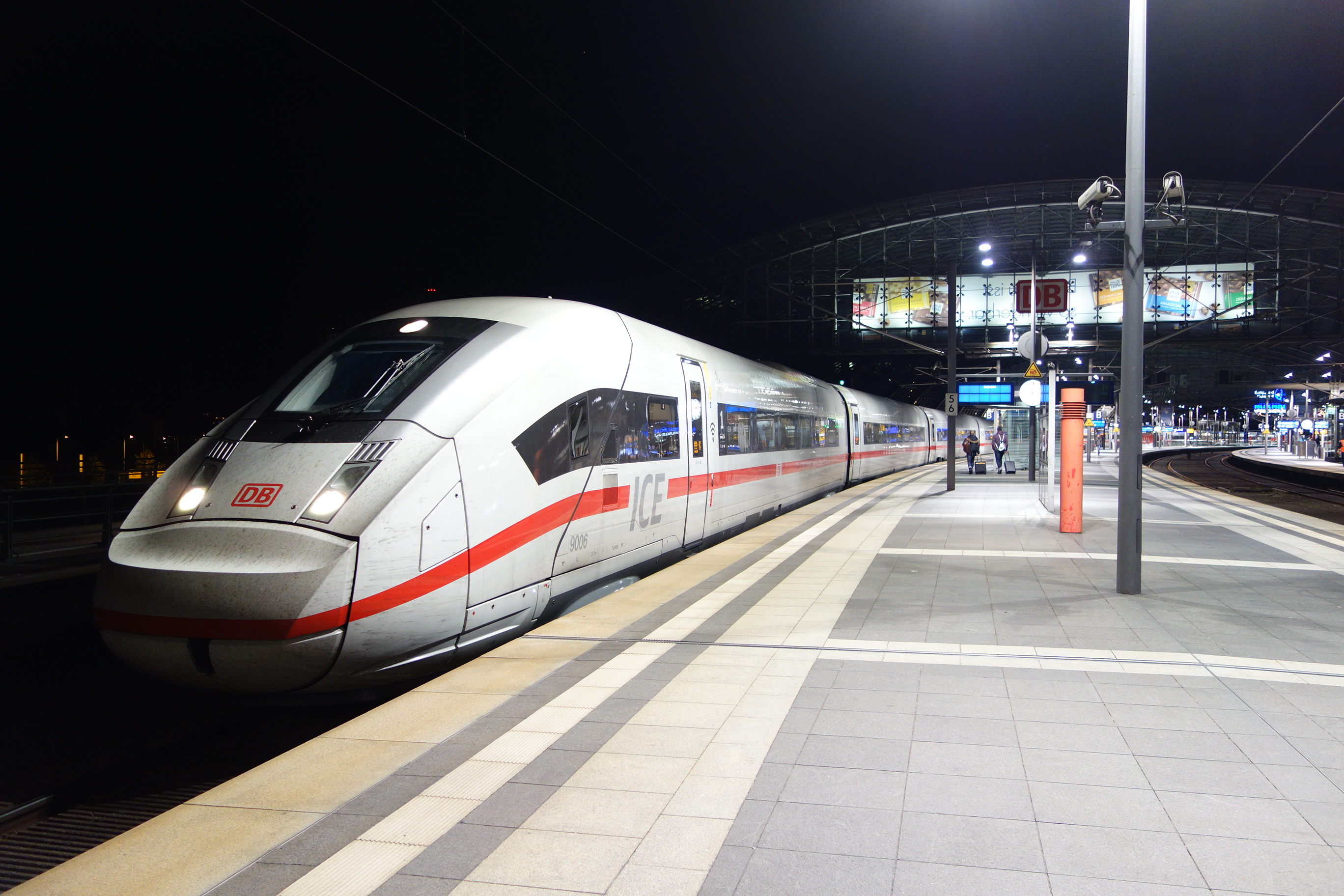 ICE 4 der Deutschen Bahn (Baureihe 412) in Berlin Hauptbahnhof